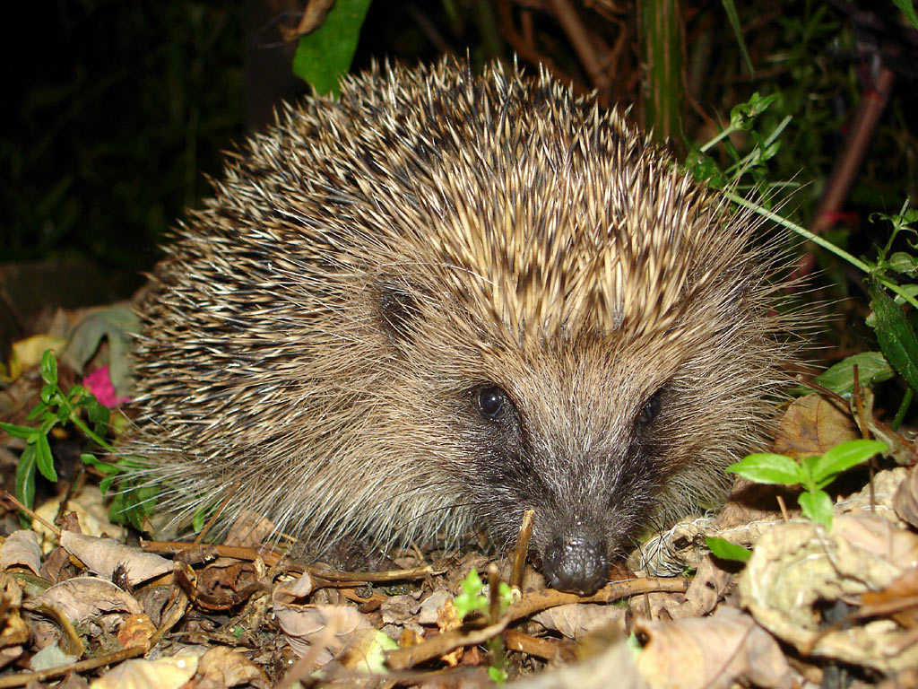 ježek angl. wikipedie